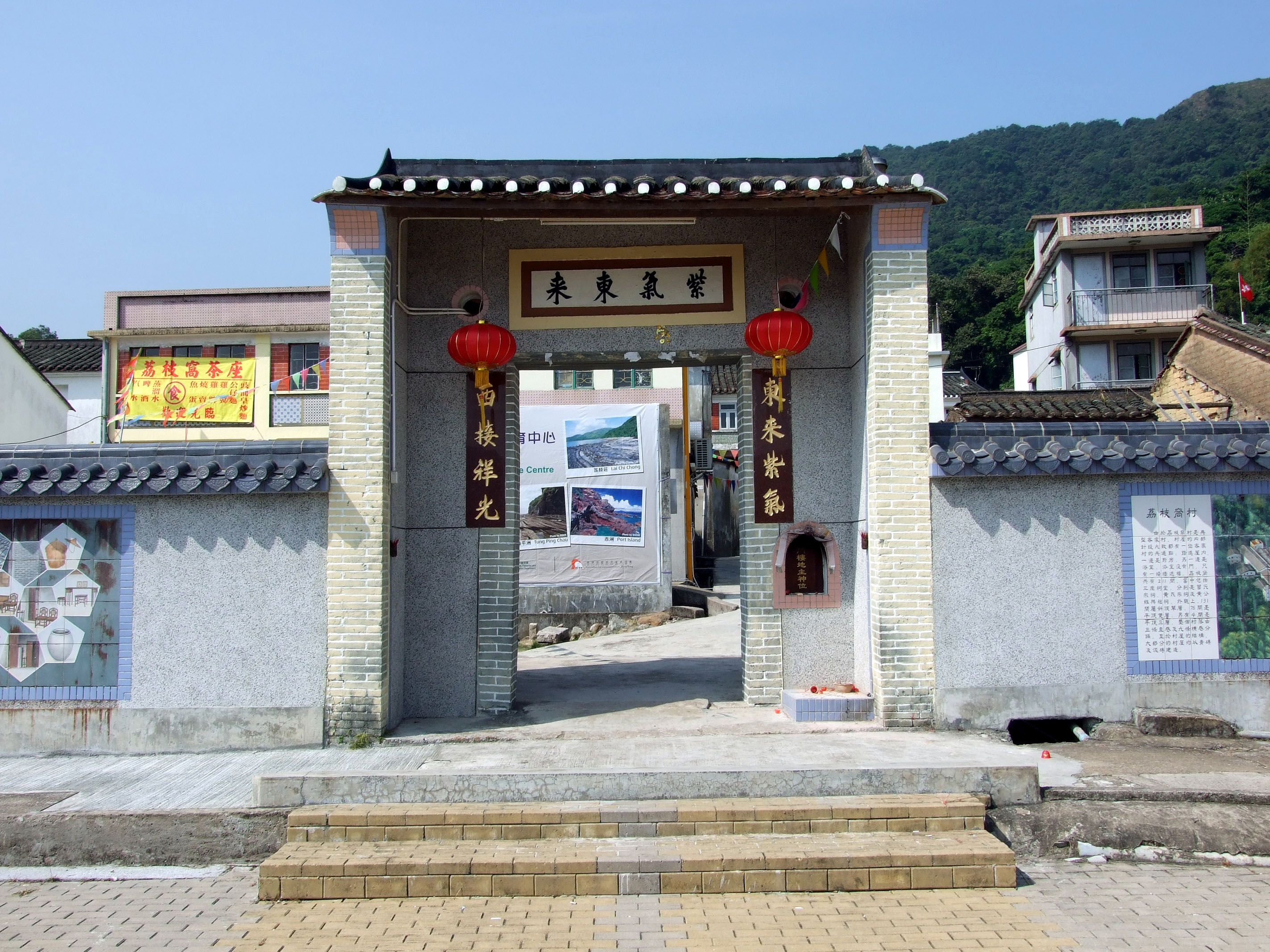 中文（香港）: 荔枝窩村